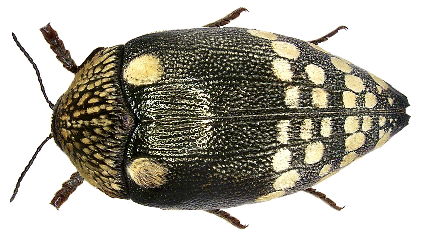 Familie: Buprestidae Grösse: 52 mm Verbreitung: Ostafrika Fundort: Kenia, Tsavo National Park leg.det. U.Schmidt, 1991 Foto: U.Schmidt, 2006